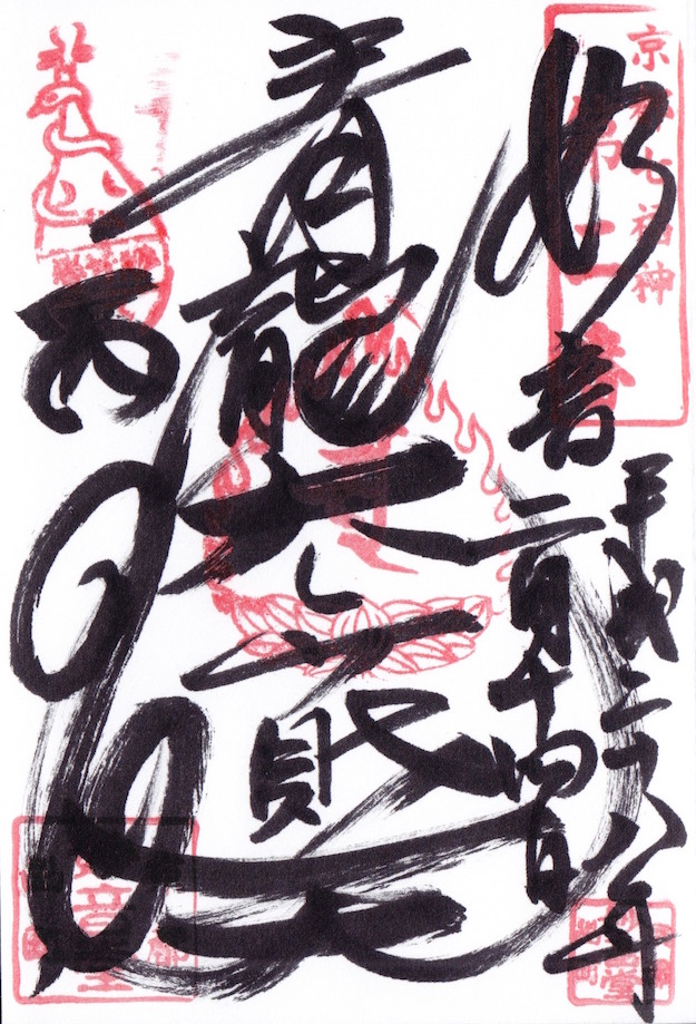 京都府京都市妙音堂所授予的一张御朱印。